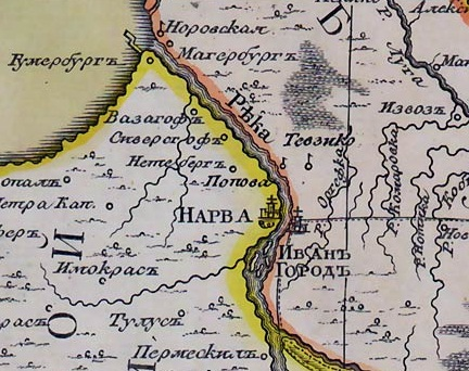 Фрагмент карты 1770 года Я.Ф.Шмита.